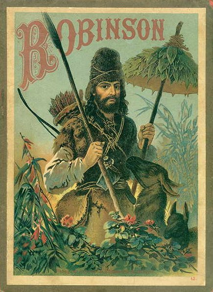 Deckelbild von Carl Offterdinger des Romans Robinson. Ein Lesebuch für Kinder. Von Joachim Heinrich Campe. Mit sechs Farbdruckbildern nach Aquarellen von Prof. C. Offterdinger. Achte Auflage. Stuttgart und Leipzig, Verlag von Wilhelm Effenberger (F. Loewe's Verlag). (ca, 1889). Die erste Auflage dieser Ausgabe ist 1887 als siebte Auflage erschienen.